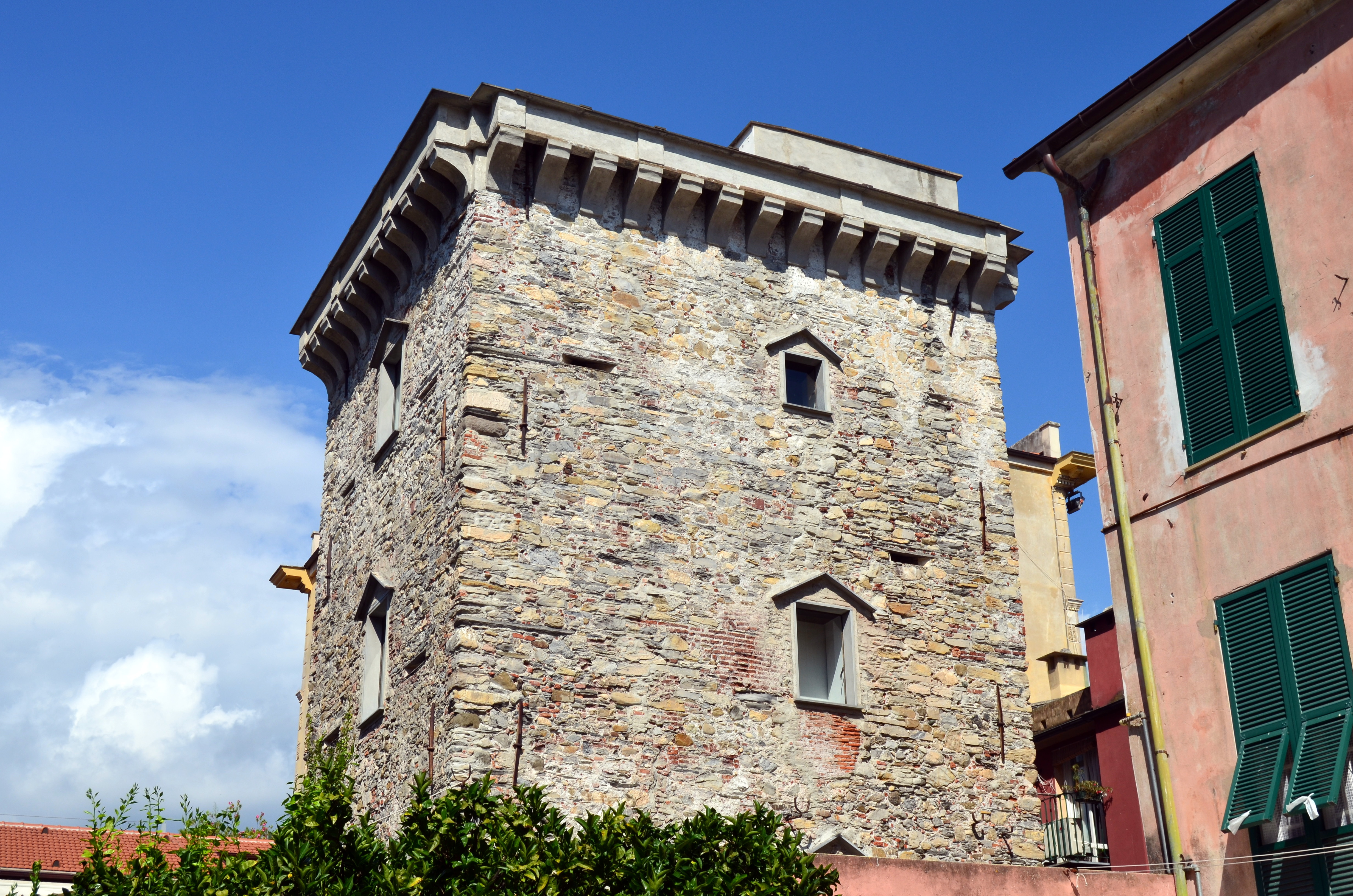 Torre del Borgo, Lavagna, Liguria, Italia